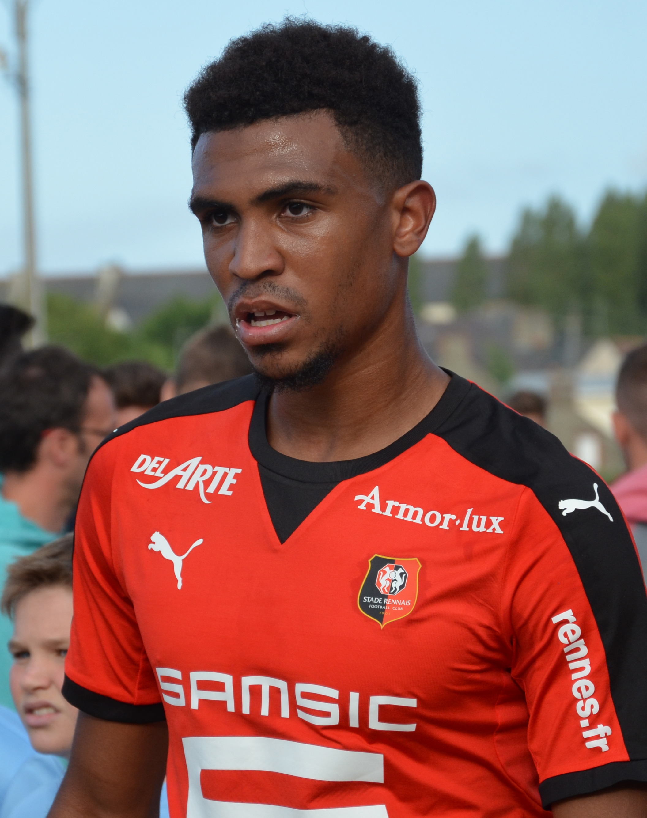 Photographie prise lors du match opposant le Stade rennais au Havre AC en amical au stade Paul-Audrin de Dinard le 8 juillet 2015. Ici, Cédric Hountondji.